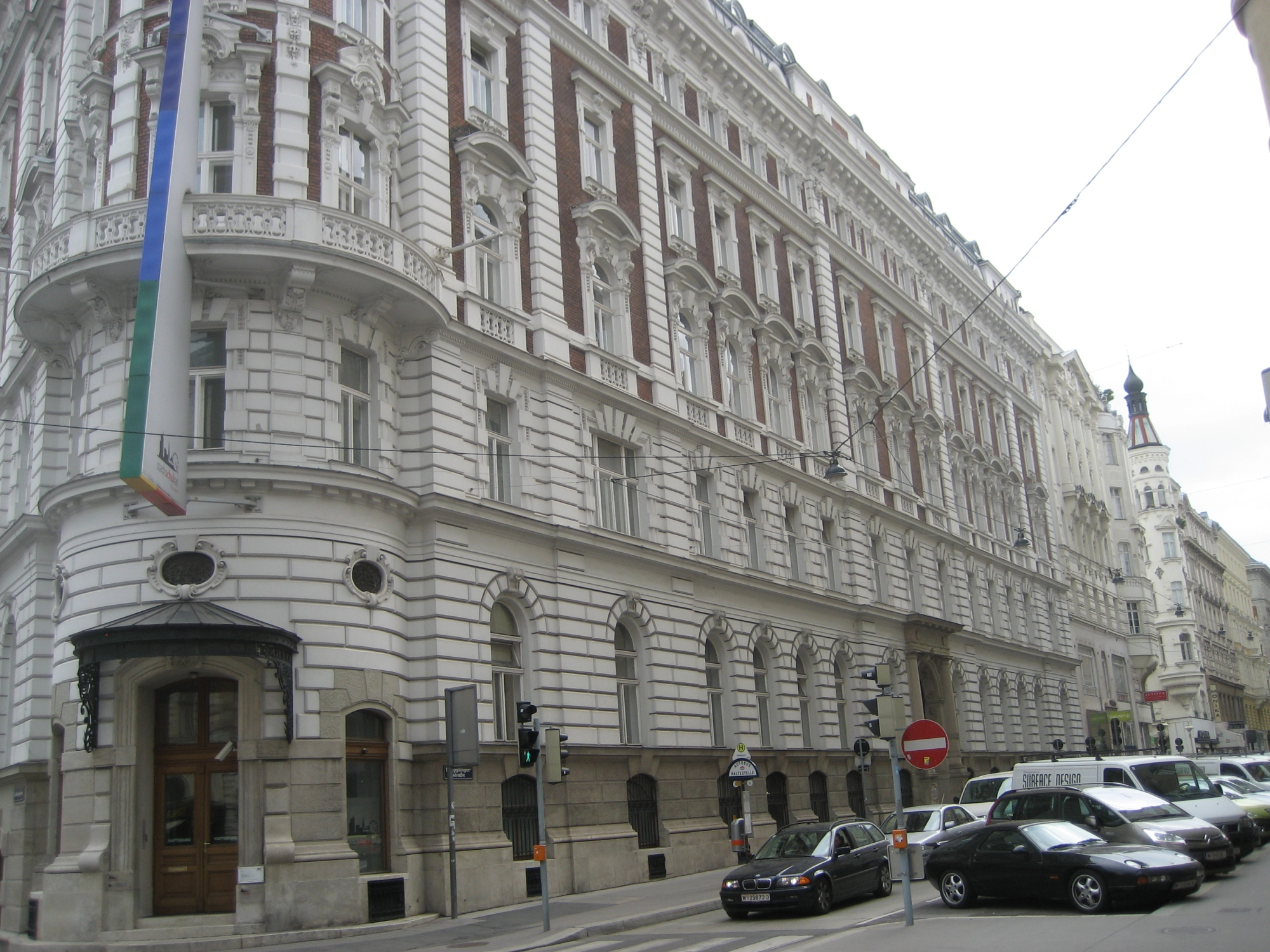 das Haus Wipplingerstraße 28 im 1. Bezirk, in Wien